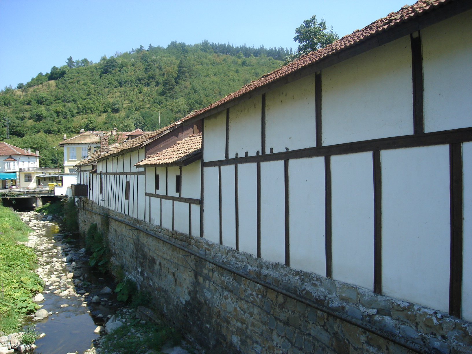 Река Стоевска, преди да се влее в Радевската и да образуват Тревненската река. В ляво е кметството в Плачковци.